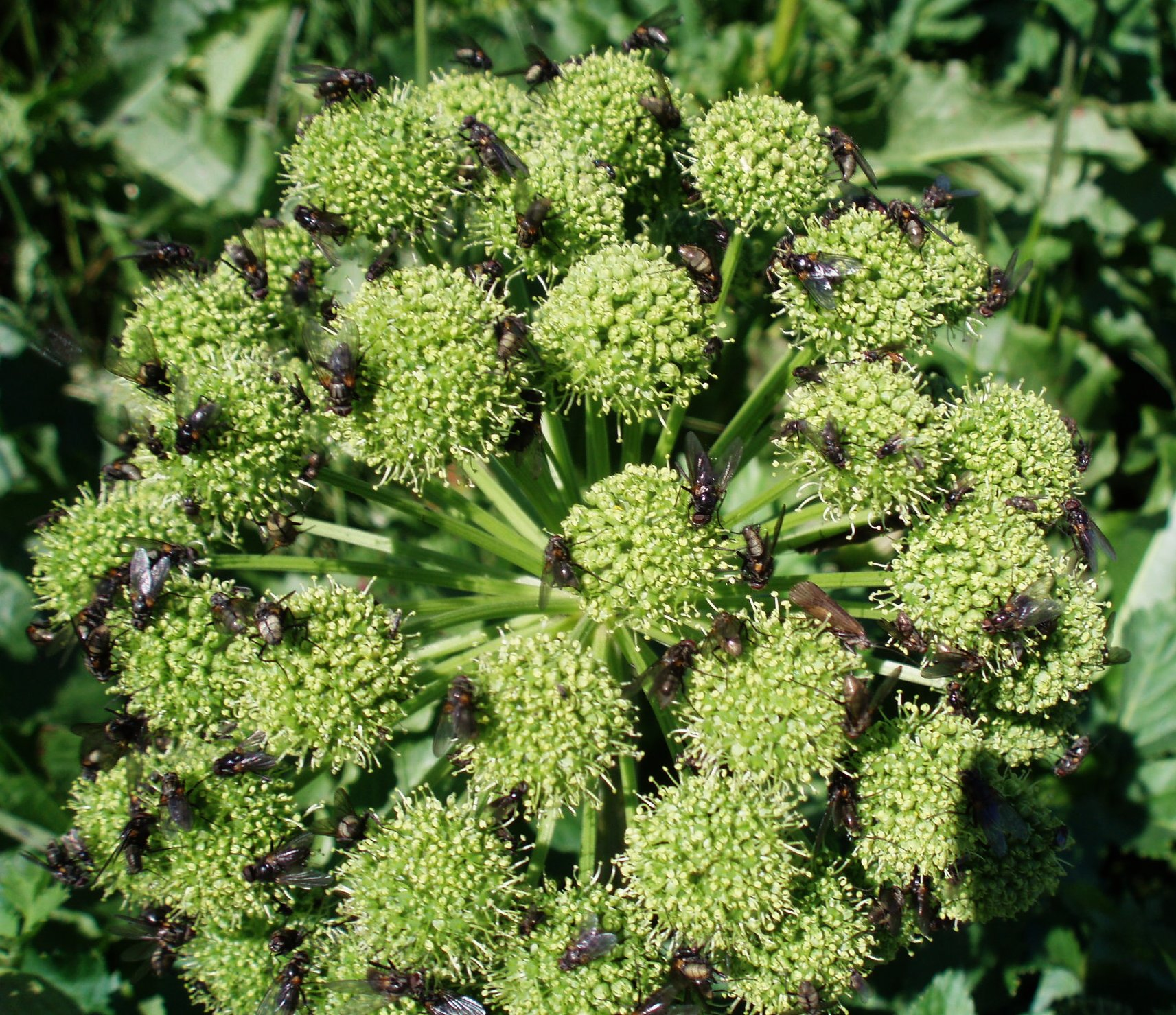 Angelica_archangelica (Angelika oder Engelwurz) in Iceland